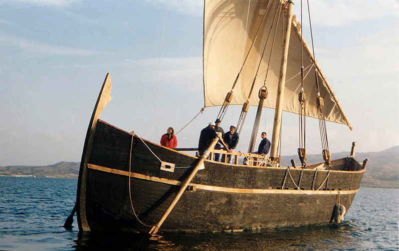 Mahoana Pontica